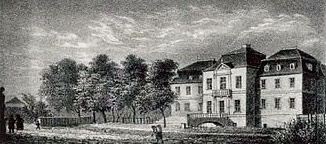 Schloss Meuselwitz, Ausschnitt aus einer Postkarte